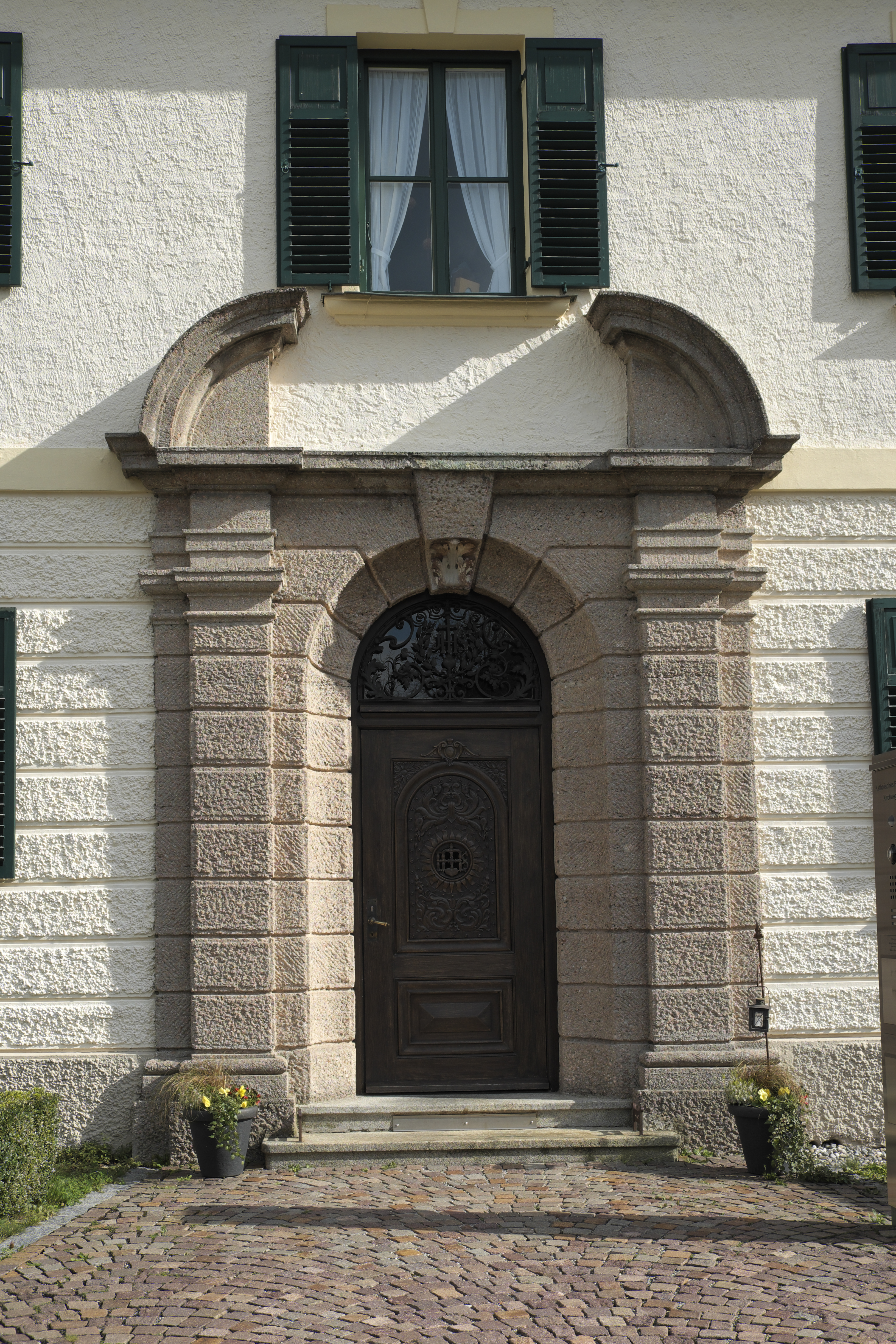 Pfarrhaus in Rott am Inn im Landkreis Rosenheim (Bayern/Deutschland)